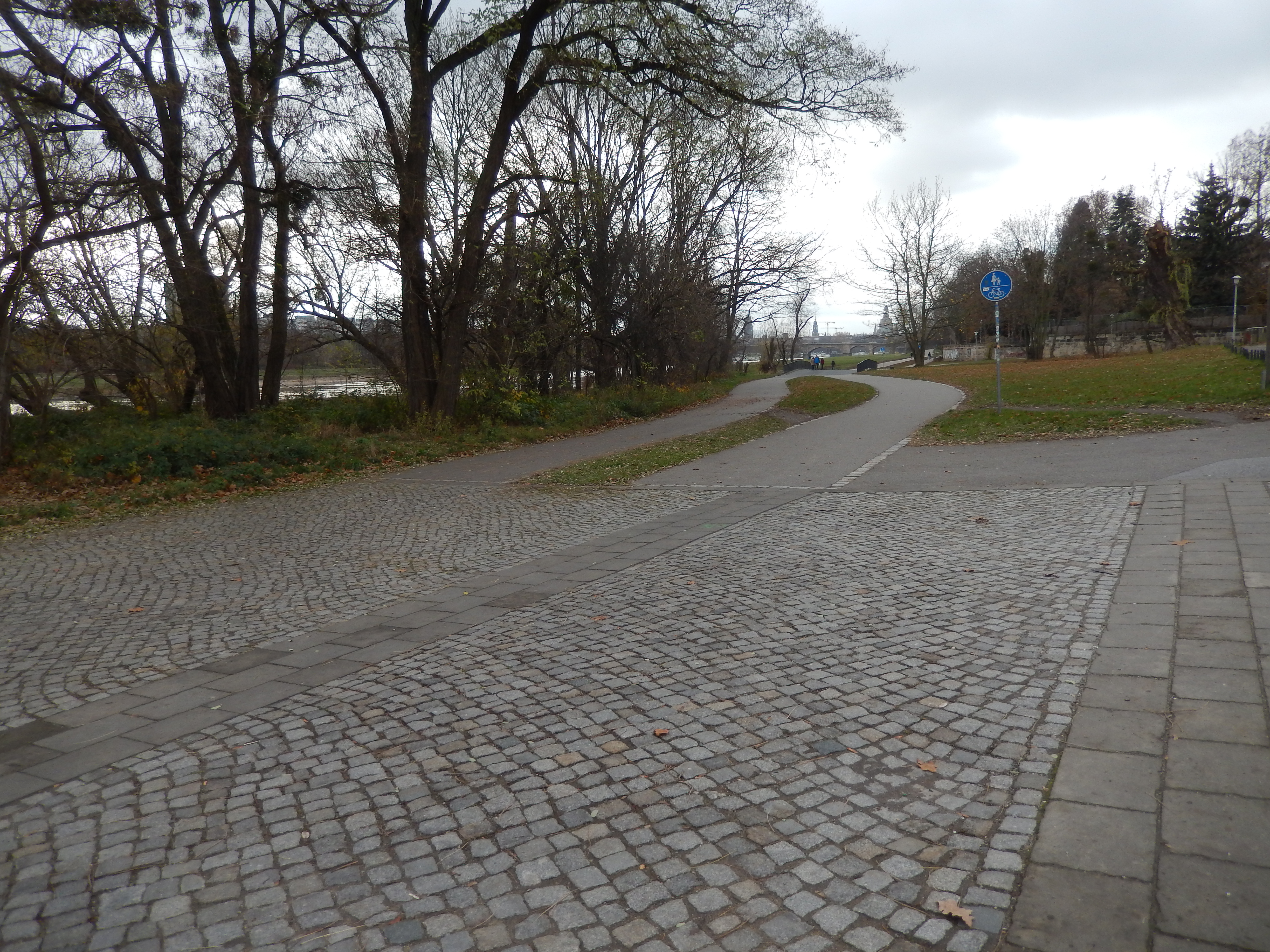 Dresden Körnerweg: Der Körnerweg entstand bereits vor dem Jahr 1700 und verband als Marktweg das Dorf Loschwitz mit der Stadt Altendresden (Dresdner Neustadt). Die Händler und Bauern brachten so ihre Erzeugnisse in die Stadt. Im Zeitalter der Industrialisierung benutzten die Bomätscher (Schiffszieher) den Weg zum Ziehen der Elbkähne. Der Weg wurde um 1908 verbreitert und endete an der Holzhofgasse. Heute wird er von Wanderern und Spaziergängern genutzt und ist Bestandteil des Elberadweges. Sanierung ist geplant. An der Prießnitz